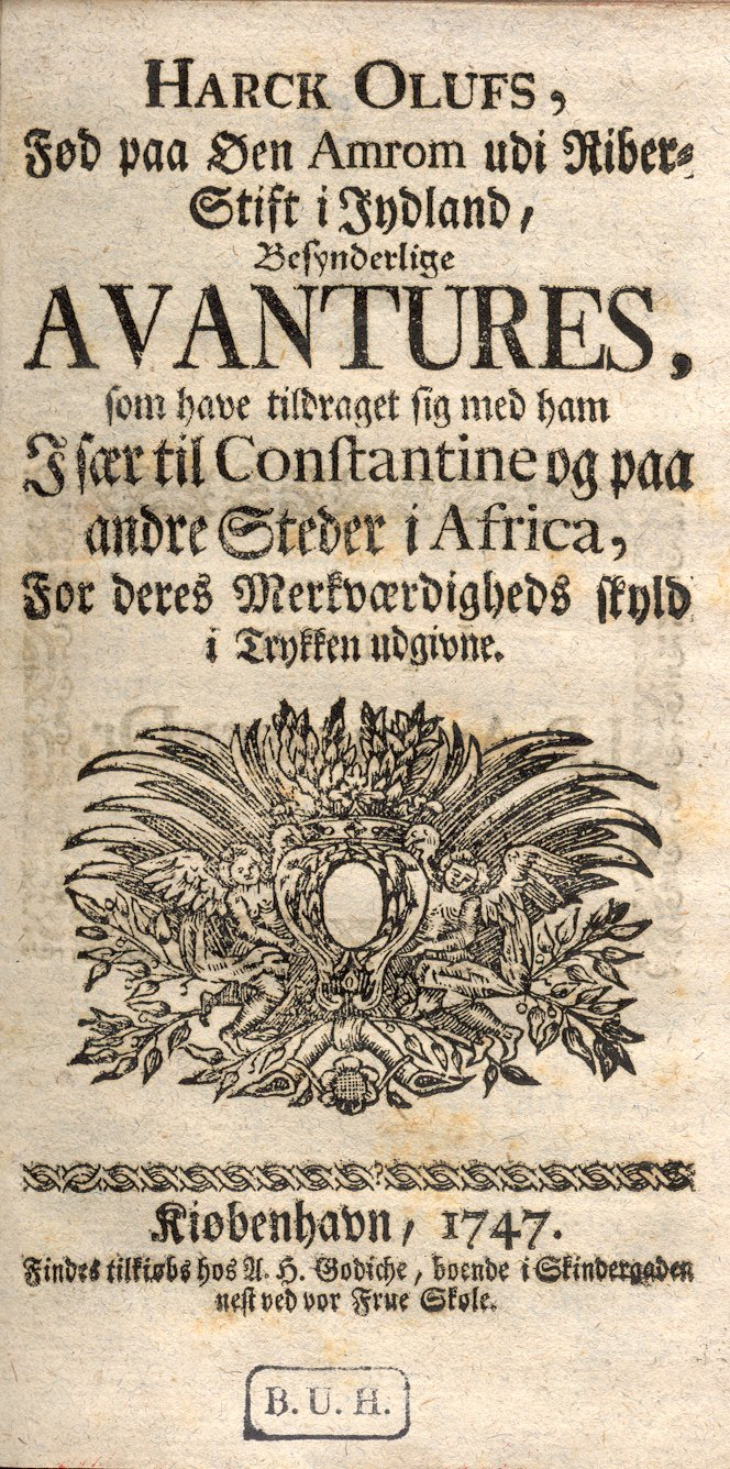 Forside af Hark Olufs' selvbiografi fra 1747